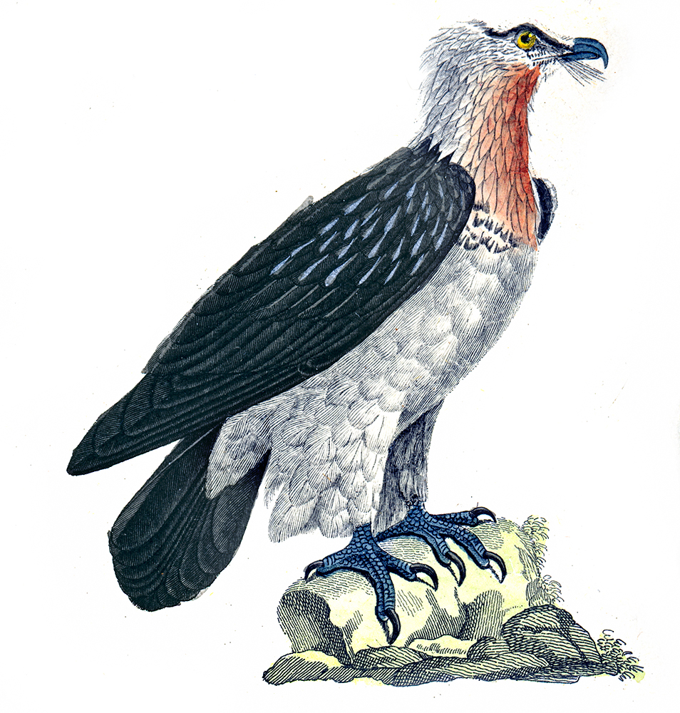 Griffon dans l'édition de 1837 des oeuvres complètes de Buffon